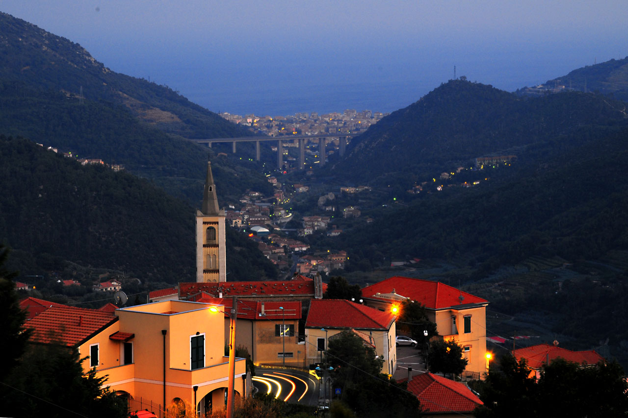 Anochecer en la localidad de Magliolo, con vista el mar Mediterraneo.